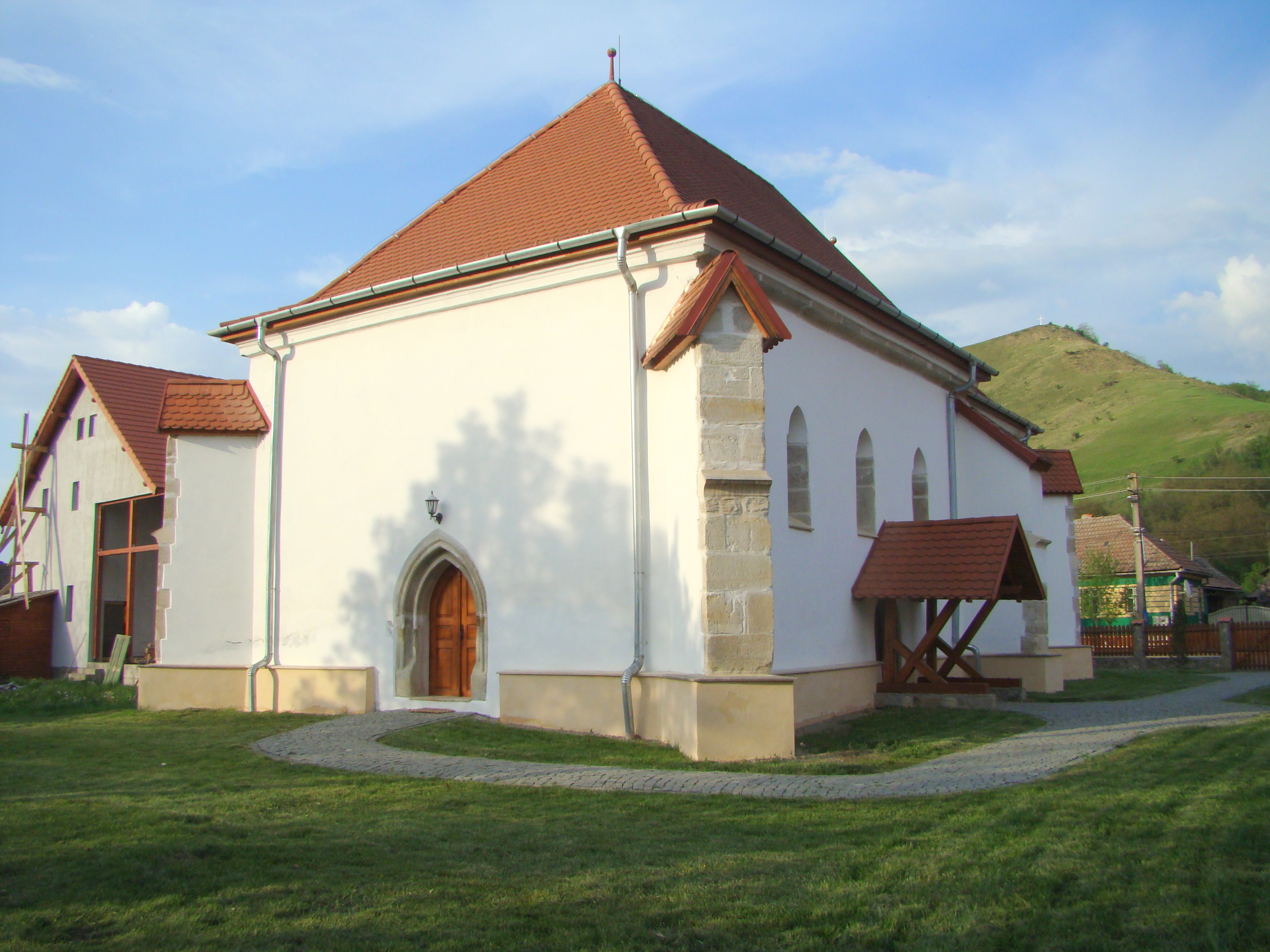 Biserica reformată, sat Matei; comuna Matei 01